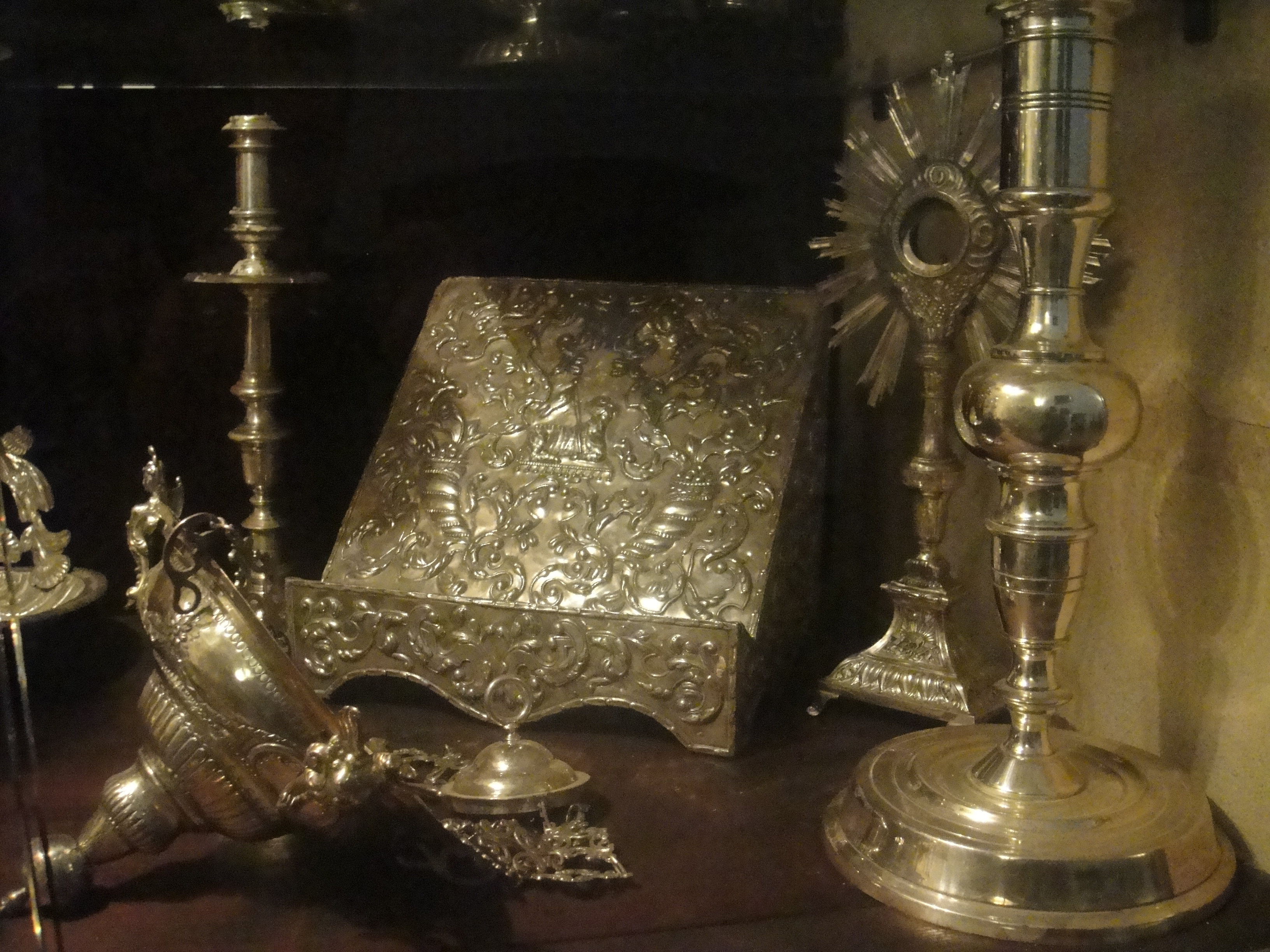 Orfebrería. Sacristía de la iglesia de Santa María la Mayor de Trujillo, provincia de Cáceres, (España).